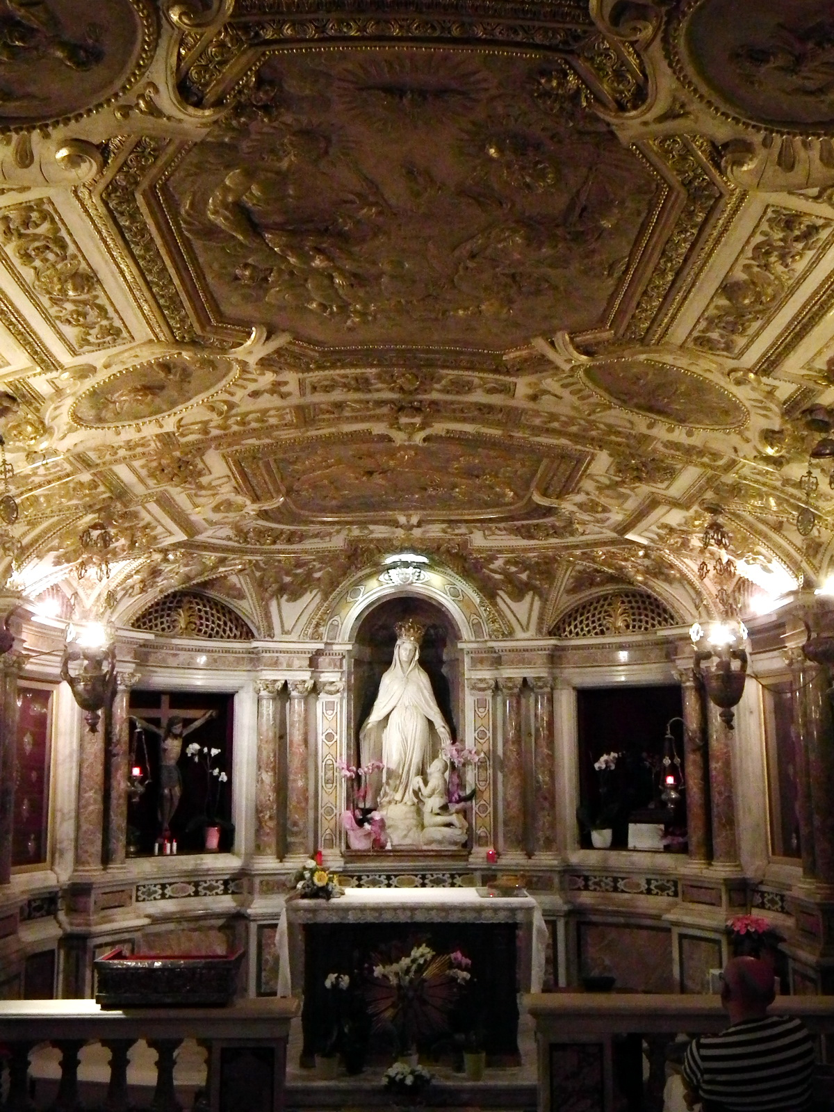 Crypt, Santuario di Nostra Signora della Misericordia, Savona, Italy